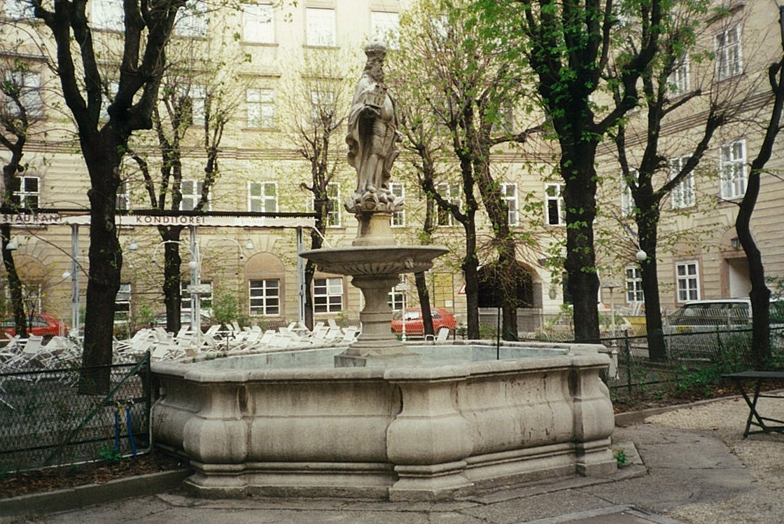 Schottenstift_Brunnen